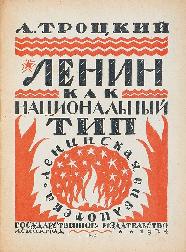 Троцкий - Ленин как национальный тип (1924, обложка)